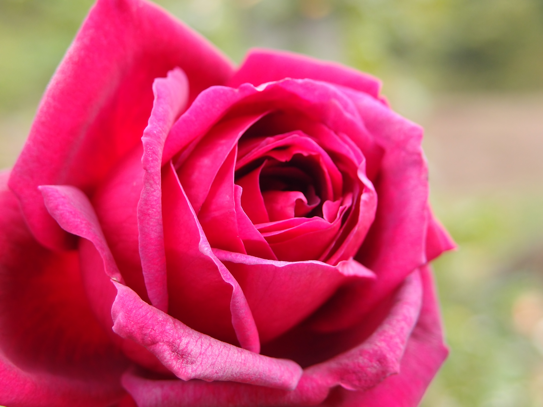 Rose Karl Herbst バラ カール ヘルプスト Hybrid Tea rose ハイブリッドティーローズ Germany ドイツ Kordes 1950